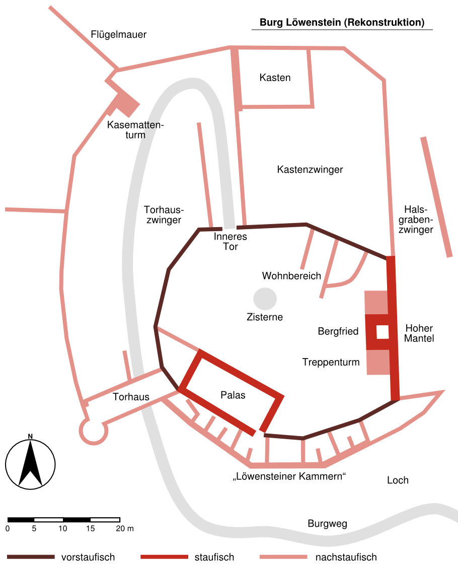 Rekonstruktion der Burg Löwenstein.